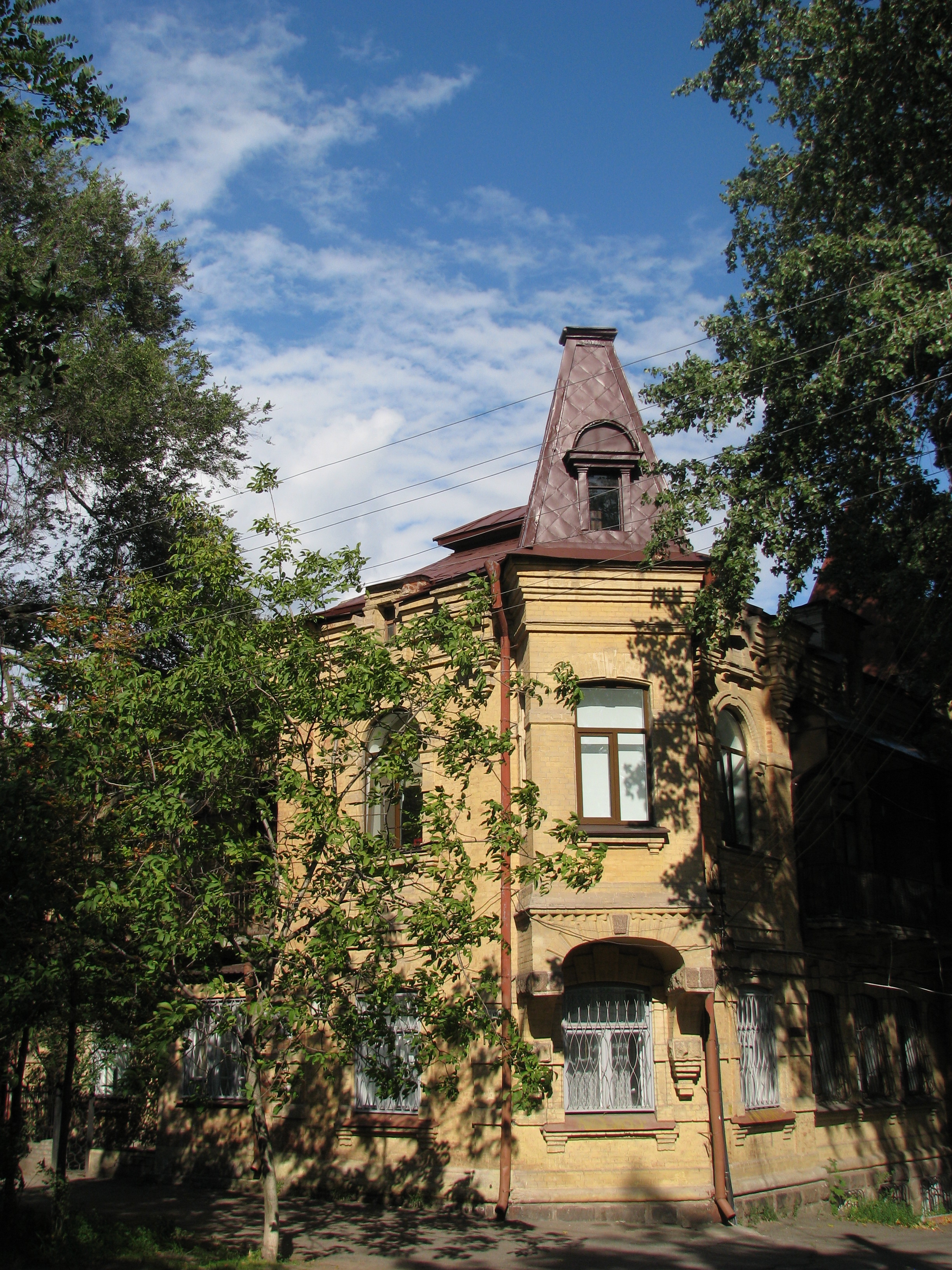 Дніпропетровськ, вул. 8-го Березня, 19